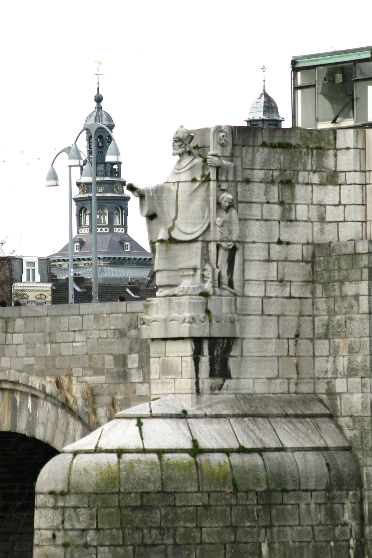 Sint Servaas Statue op engem Pilier vun der Bréck.